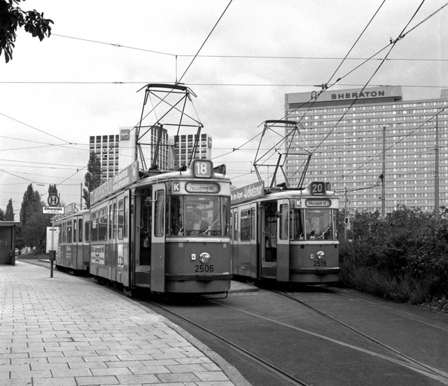 Effnerplatz tram terminus, Munich